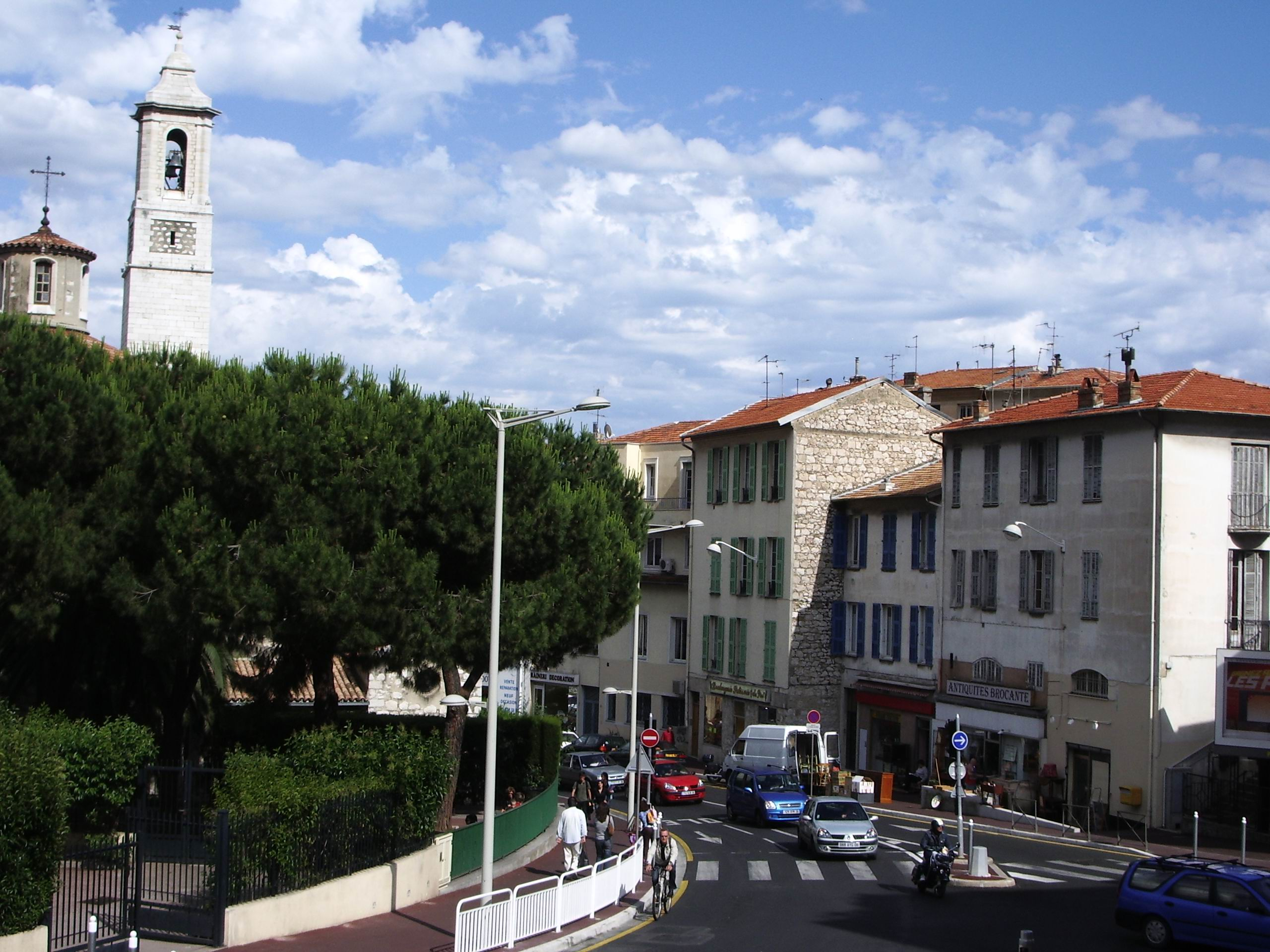 L'avenue de Pessicart au niveau du numéro 27 et a sa gauche le clocher de l'église St paul. Sur demande de Monseigneur Paul Rémond, évêque de Nice, l'église st Paul est construite à partir de 1935 et pendant la guerre par le prêtre bâtisseur Pierre Carmignani.